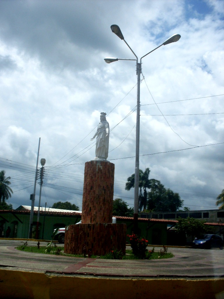 Guanare en el estado Portuguesa - Venezuela (2010)